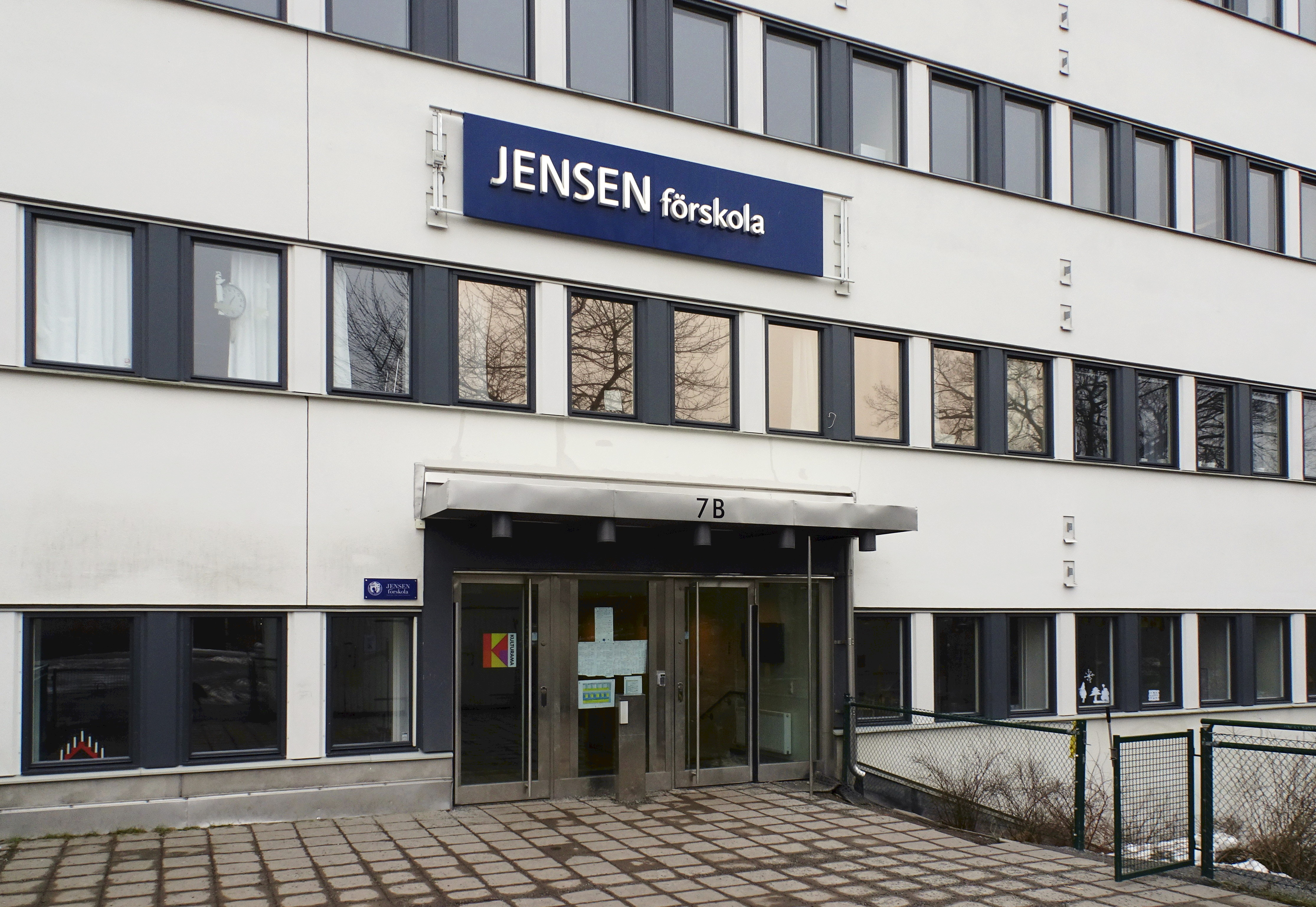 Det Vita huset, Jensens förskola